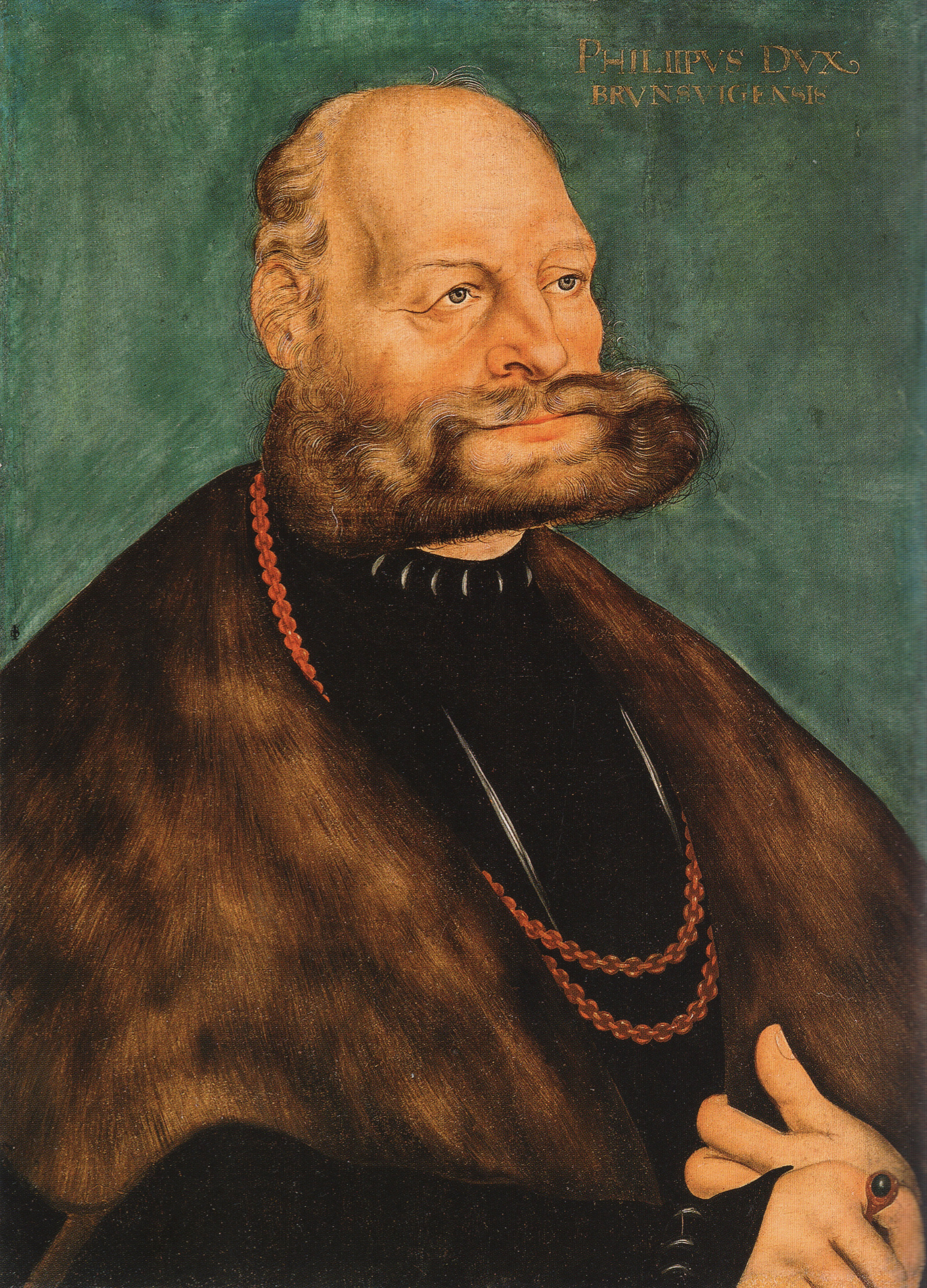 Portrait von Herzog Philipp von Braunschweig-Grubenhagen. Inschrift: PHILIPPVS DVX BRUNSVIGENSIS